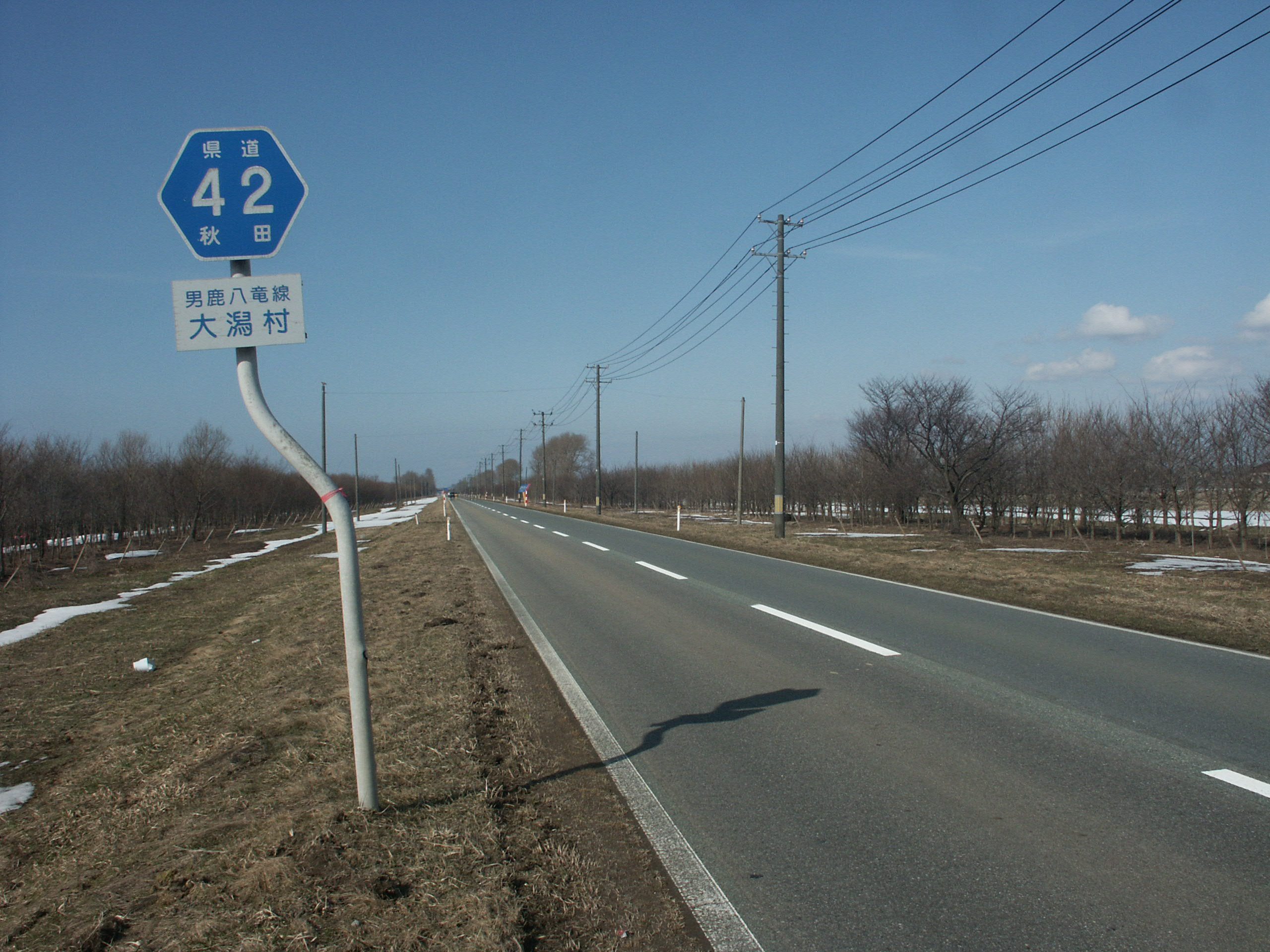 秋田県道42号線大潟村内